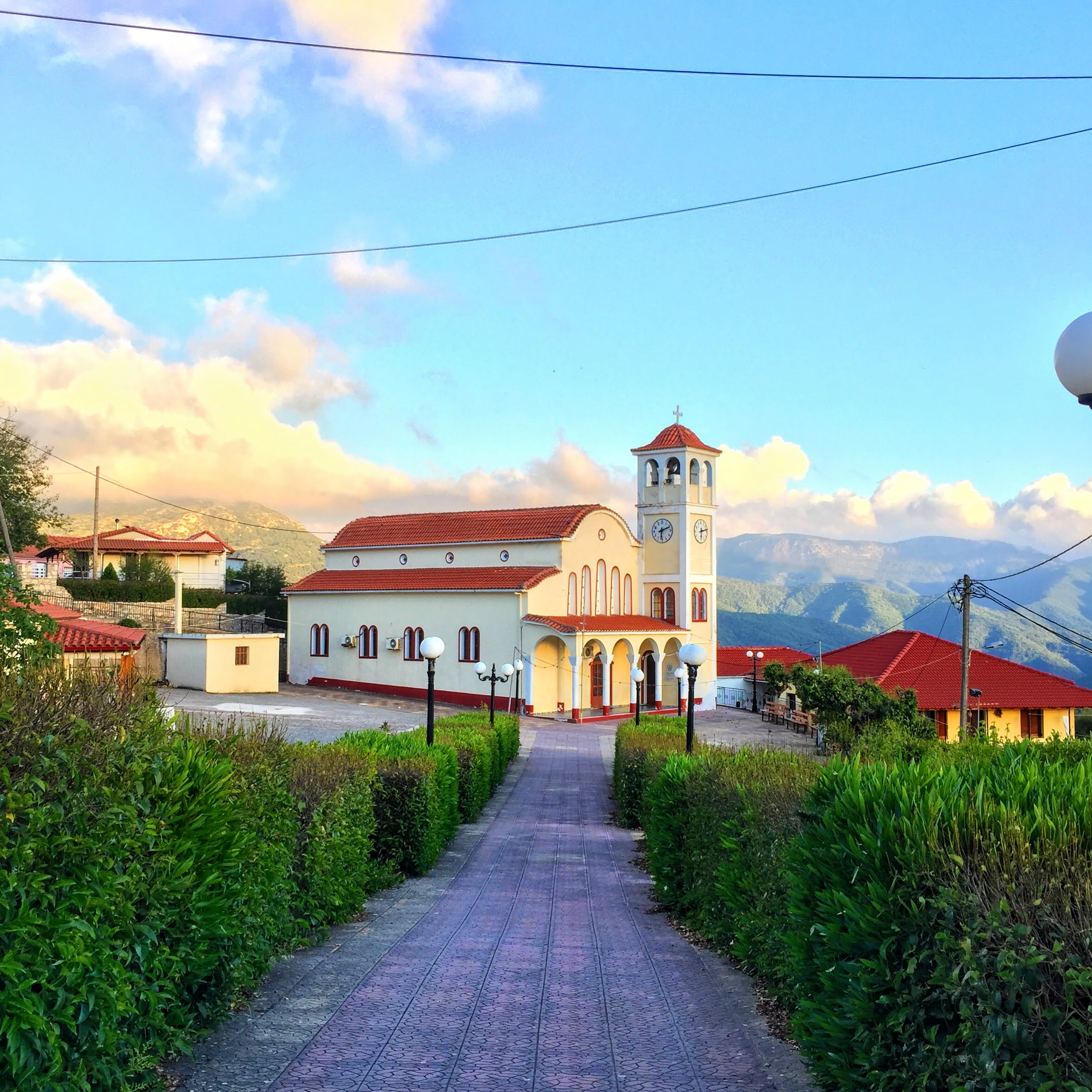 Ιερός Ναός Αγίου Δημητρίου Περδικονερίου